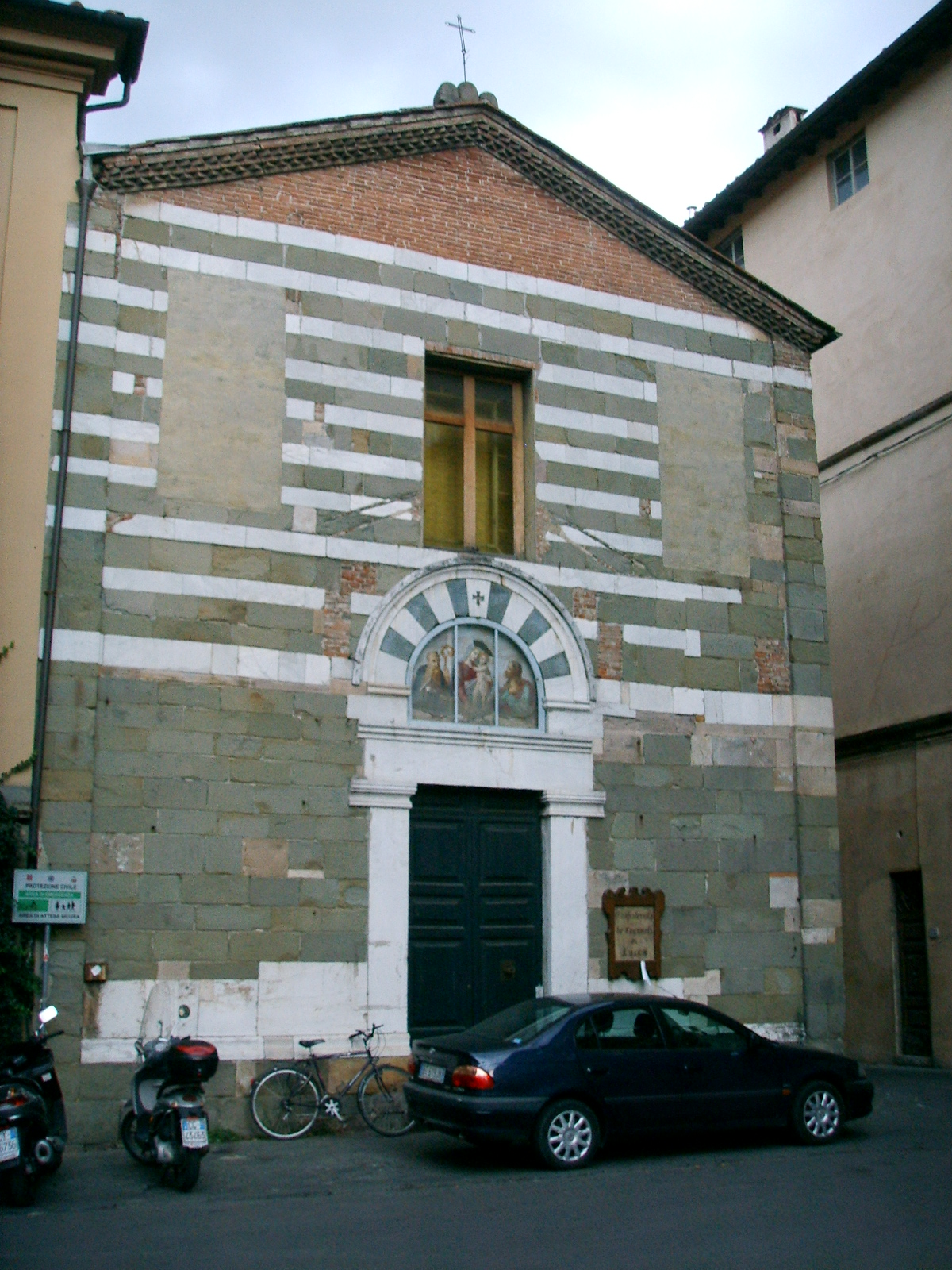 Chiesa di San Benedetto in Gottella